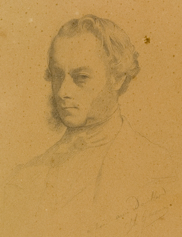 Portrait d'Alexis Douillard (1835-1906)